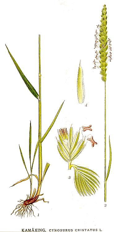 Cynosurus cristatus L. Original Description "Kamäxing", Cynosurus cristatus L.